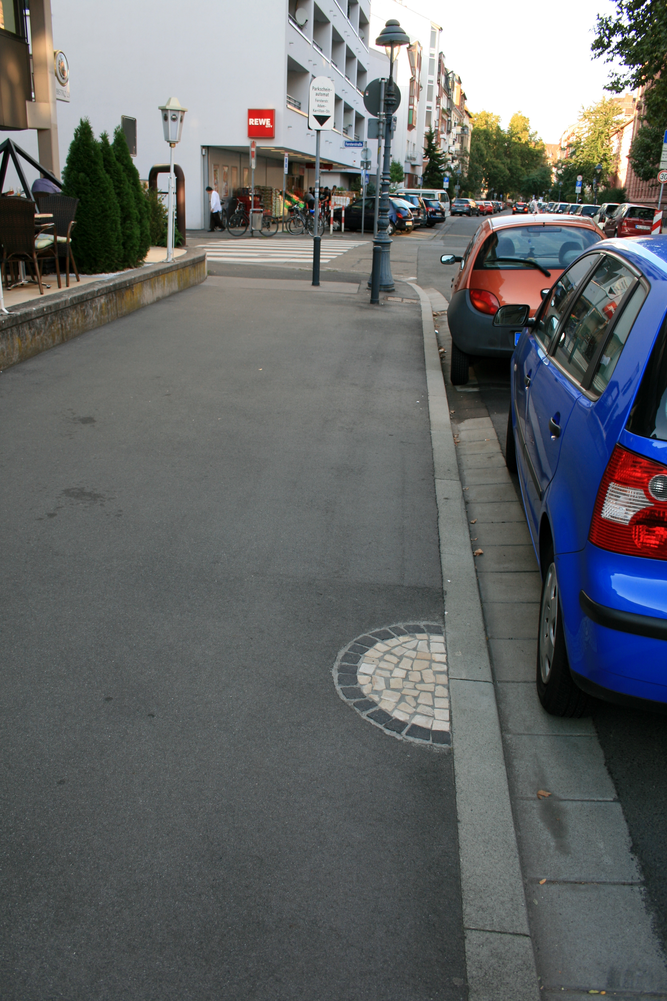 (vor) Adam-Karrillon-Straße 23 in den Bürgersteig eingelassenes halbrundes dunkles Pflasterband um ein weißes Pflastersteinfeld zum Gedenken an den Tod mehrerer Menschen durch einen Luftangriff im März 1918